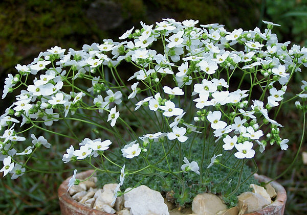 Plante en coussin de 7 à 10 cm sur éboulis et parois rocheuse calcaire du Caucase. (photo en culture)